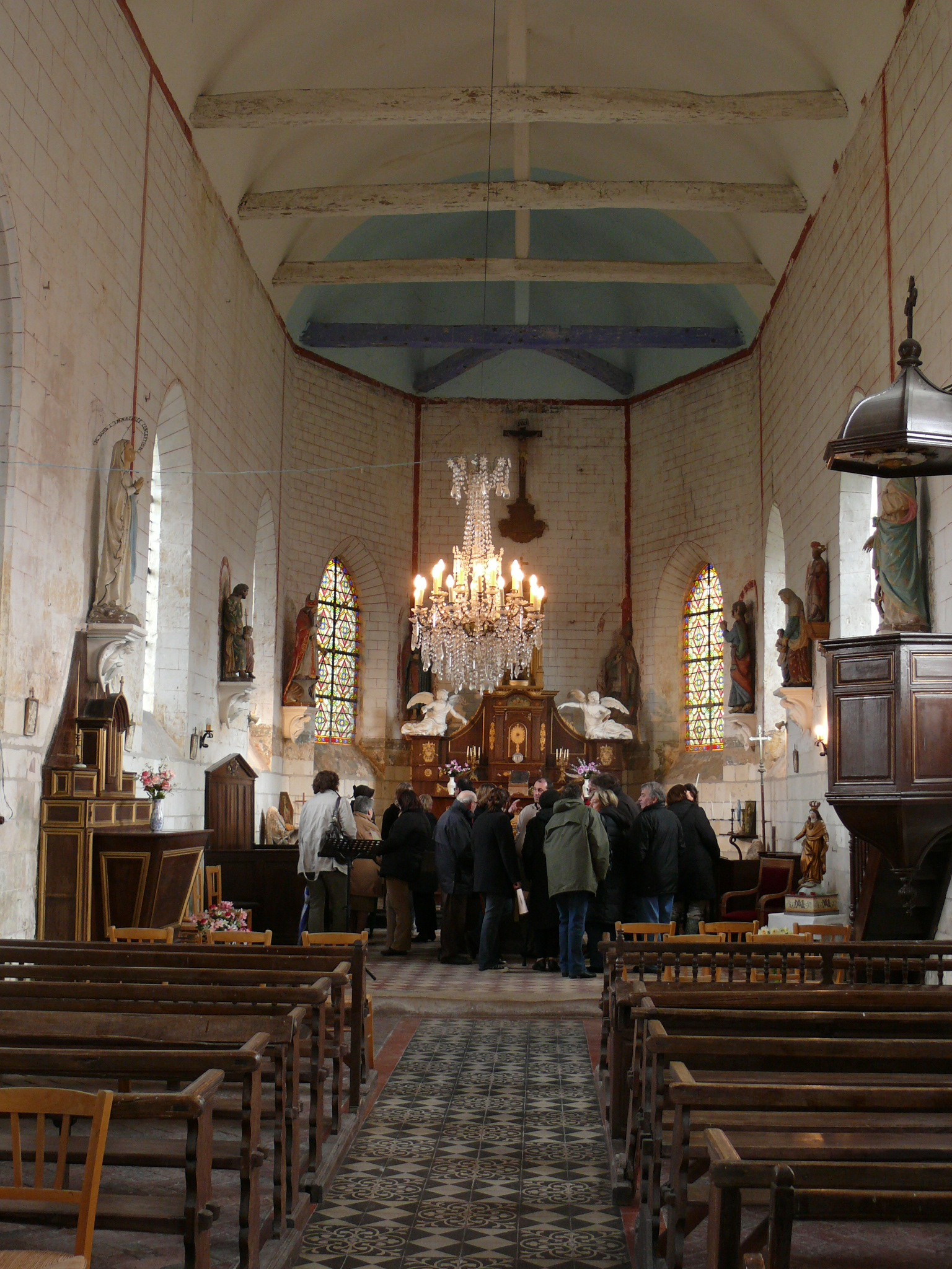 La nef de l'église Saint-Pierre de Frémontiers (Somme)